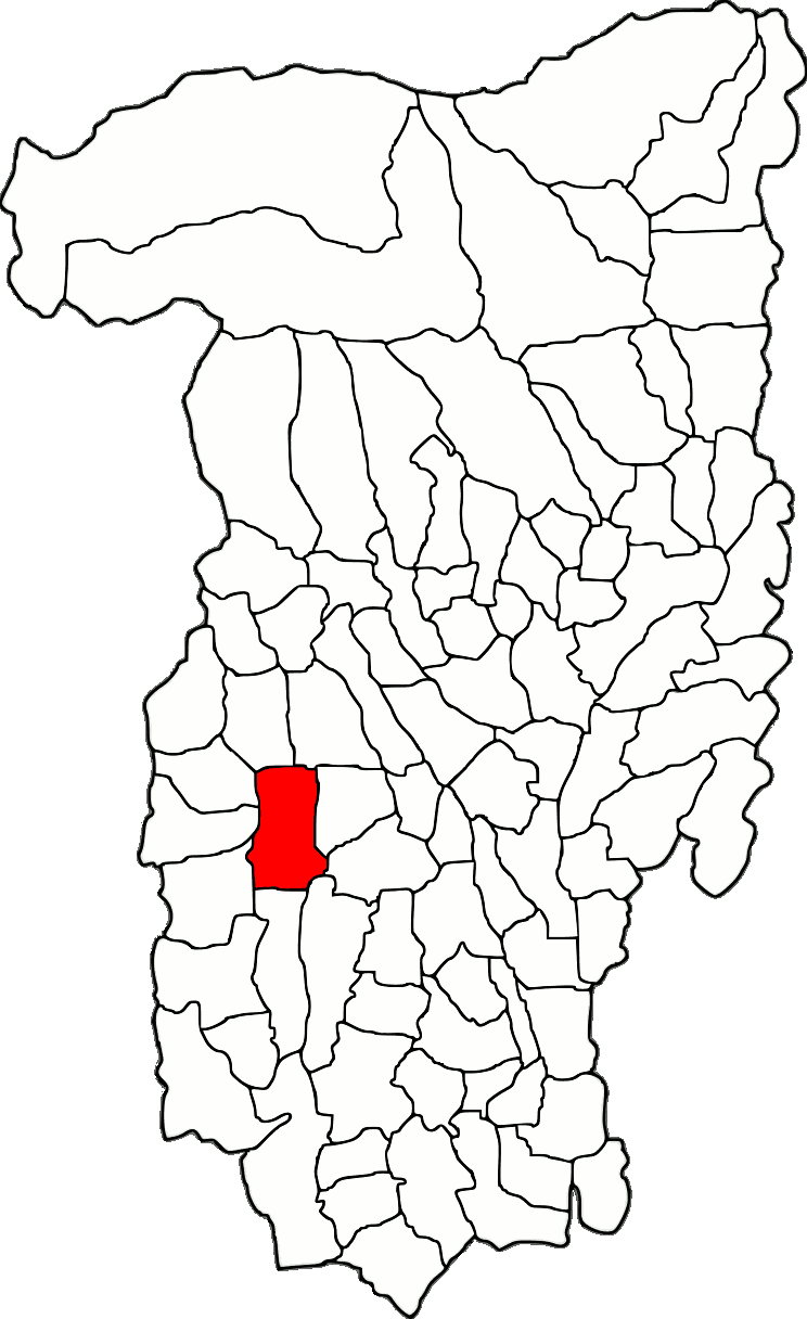 Lage der Gemeinde Roșiile im Kreis Vâlcea (RO).